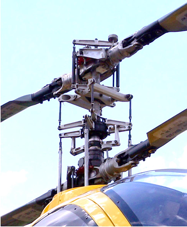 Колонка управления соосными винтами.